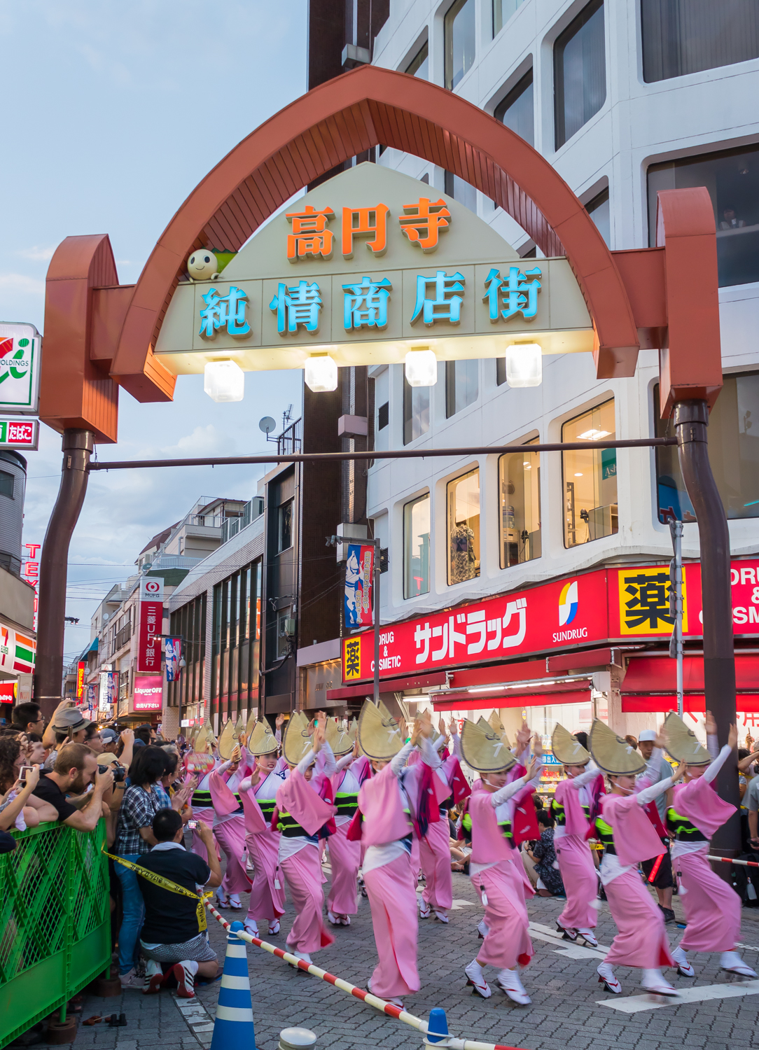 高円寺純情商店街。高円寺阿波踊り。